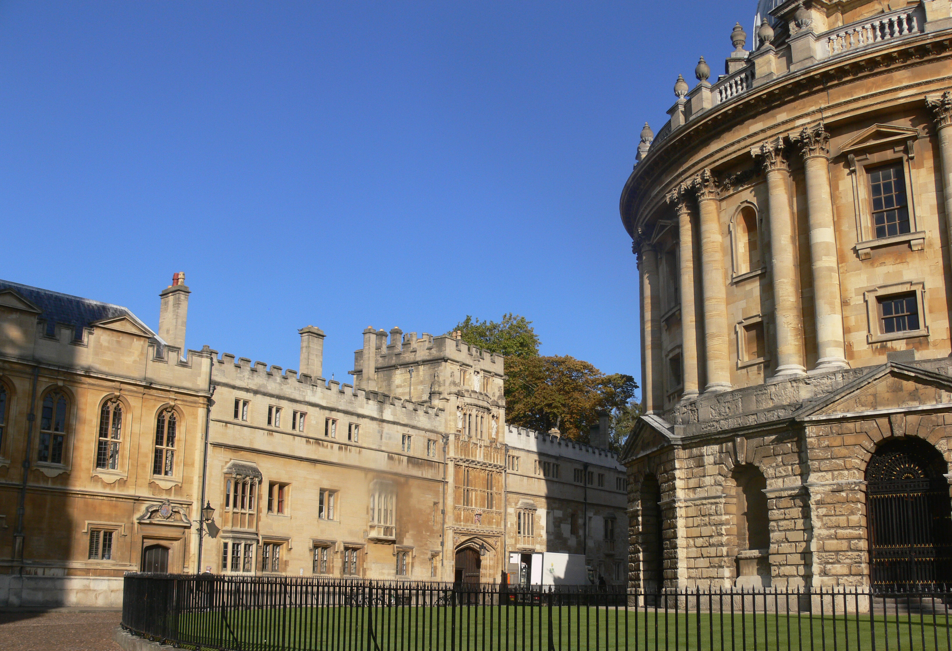 Oxford - Brasenose College